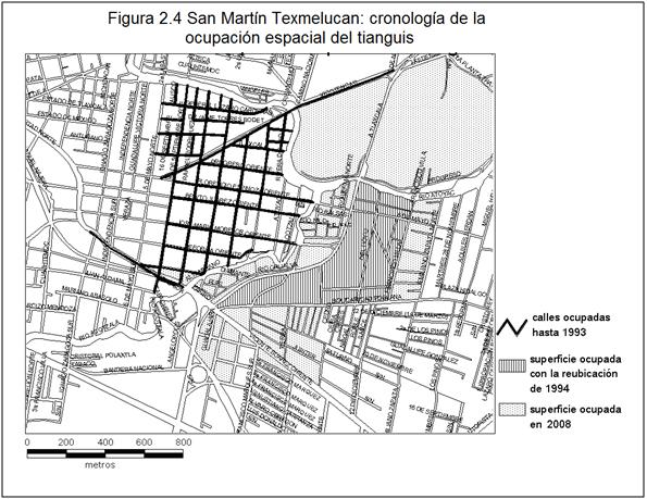 Tianguis